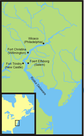 Mapa Nowej Szwecji. Autor: Paweł Wajda, 2004